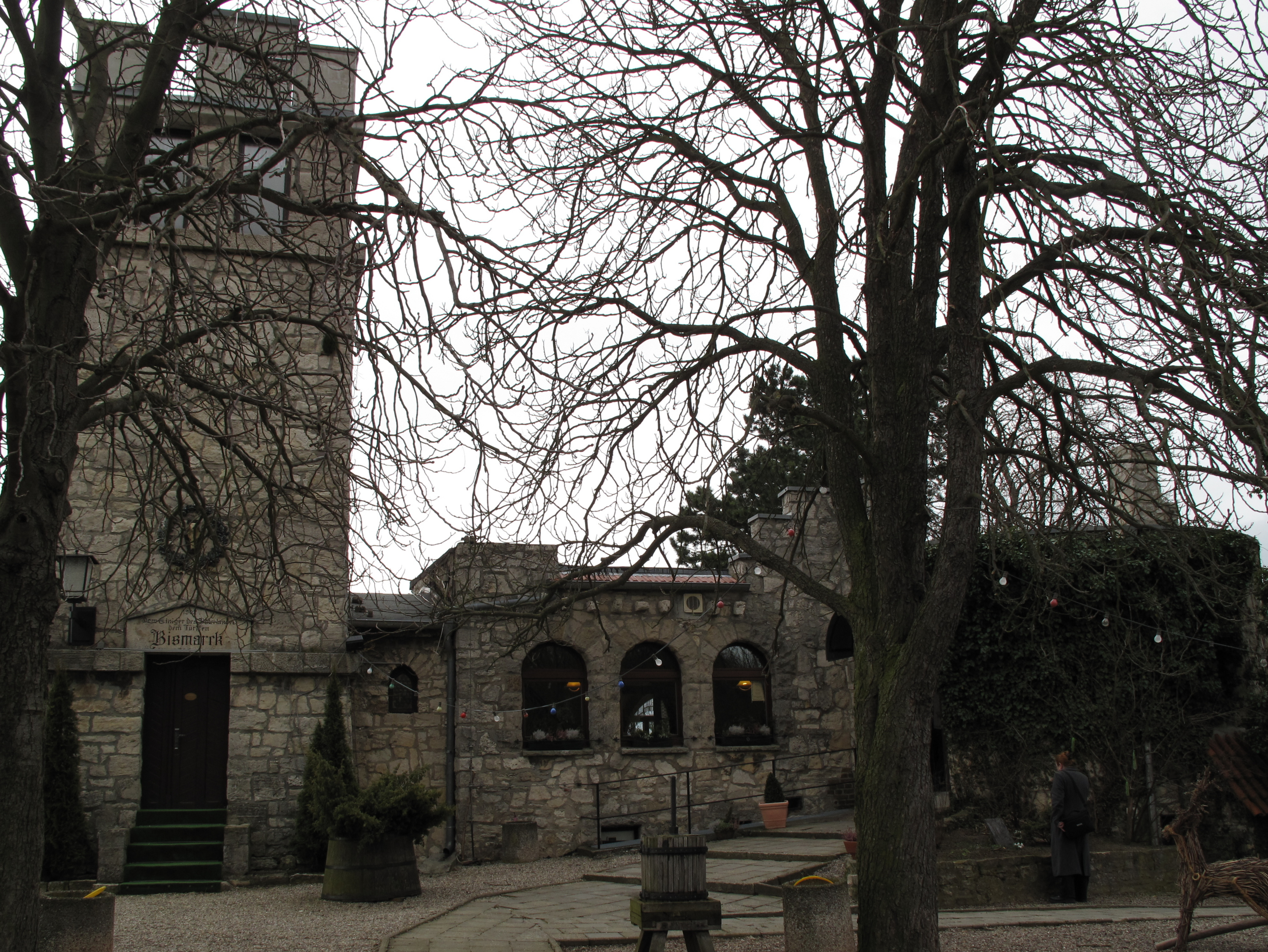 Bismarckturm bei Naumburg (Saale) Februar 2014